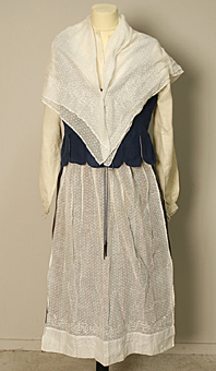 Dräkt från Mörkö socken bestående vit överdel, blått livstycke, bredrandig kjol i färgerna rött, blått ocg ljusgrått. 2 vita förkläden och halskläden i moll och tyll. Blå bindmössa med broderier med tillhörande tyllstycke. 3 par länk knappar av silver med ask. Ur gåvobrev: "Mörködräkt köptes och beställdes av Märta Brycker's far (Wirström?) i Nyköping's Hemsljöd på Öster 1939. En till min mor Märtha Wirström (SLM 31.073) och en till mig Märta Wirström-Brycker (SLM 31.074). Efter min mors bortgång 1946 övertog jag hennes dräkt. Min dotter fick min dräkt på slutet av 1950-talet. Vi använde dem tillsammans vid olika högtider fram till 1978 när min dotter gifte och flyttade till Tyskland". / Märta Brycker 2000-09-20